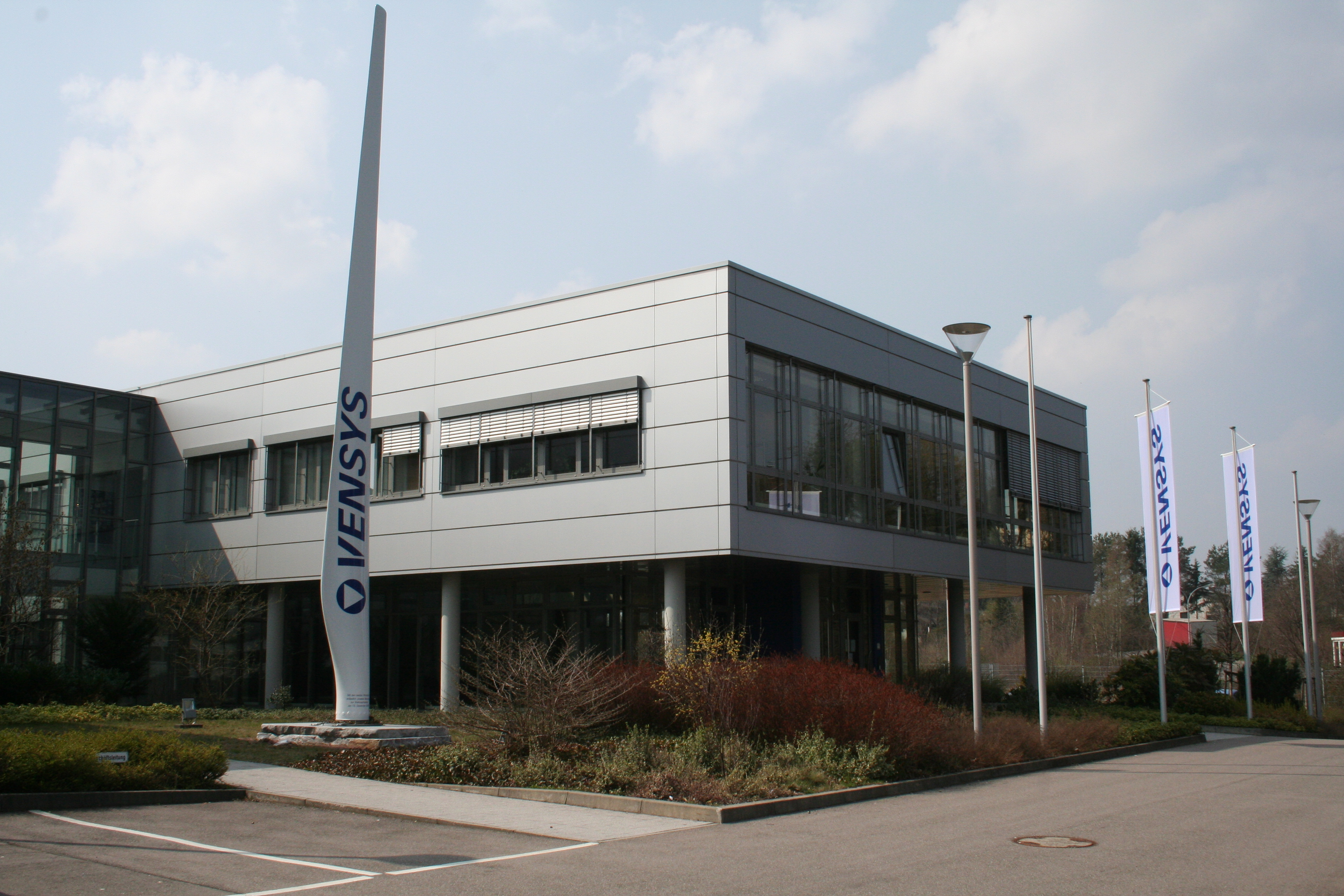 Firmensitz in Neunkirchen Saar